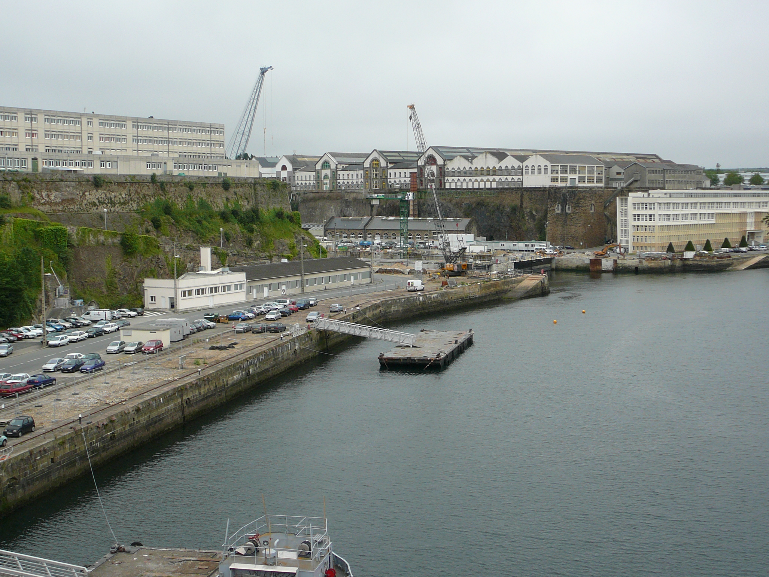 Brest : la partie de l'arsenal située en Penfeld et le plateau des Capucins vus depuis le pont de Recouvrance (en 2007)